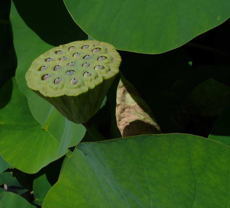 fruit de Nelumbo nucifera, 19 août 2004, Jardin des Plantes de Paris.